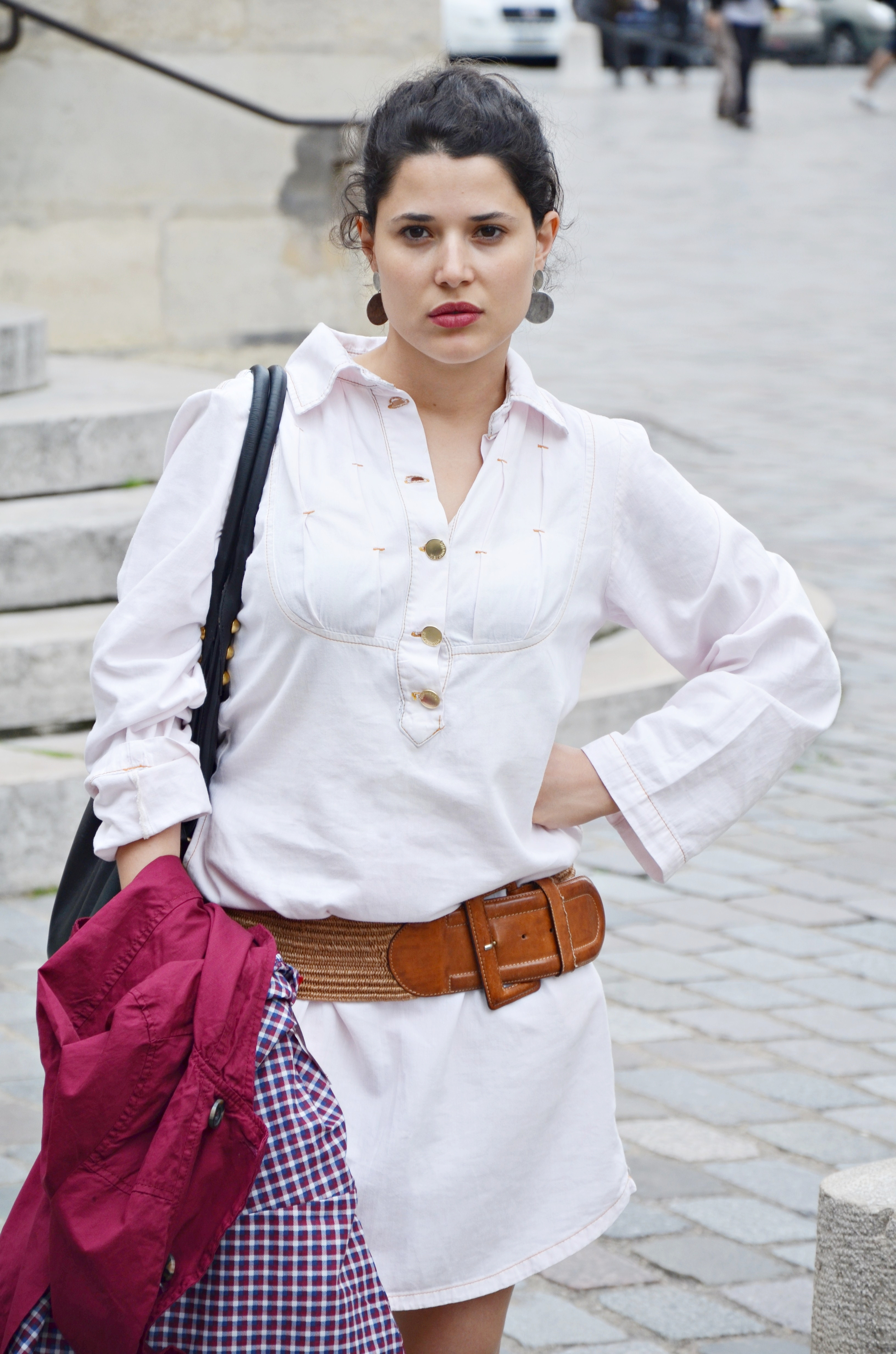 Manuela do Monte by Felipe Pilotto 2011 EUROPA PARIS 3431